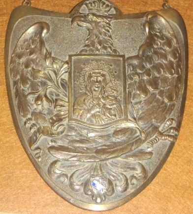 Sufit w sali 2 pułku ułanów grochowskich Instytutu im. Sikorskiego w Londynie